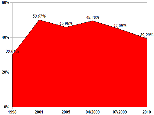 Wahlergebnisse der PCRM bei Parlamentswahlen von 1998 bis 2010